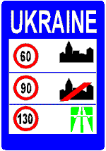 Geschwindigkeitsbegrenzung in der Ukraine